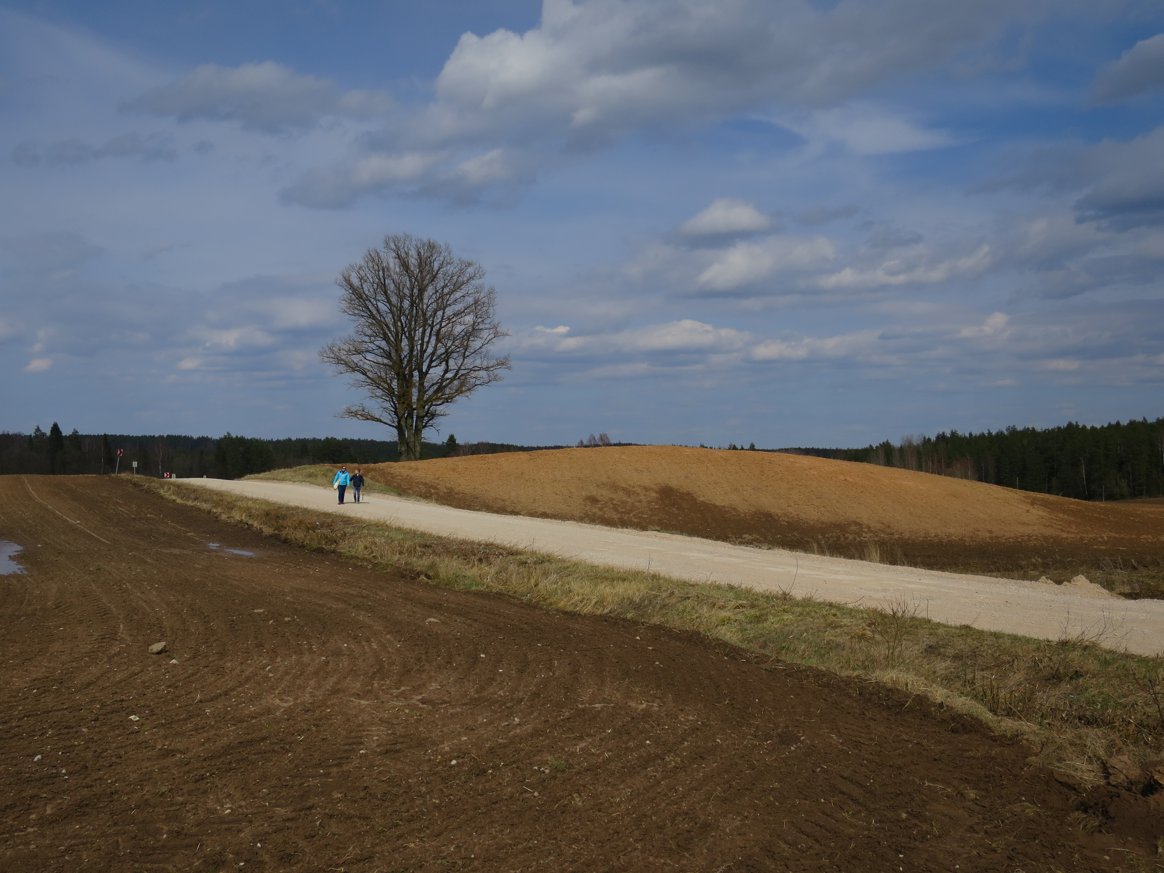 Autoceļš V330 netālu no Rāmniekiem.